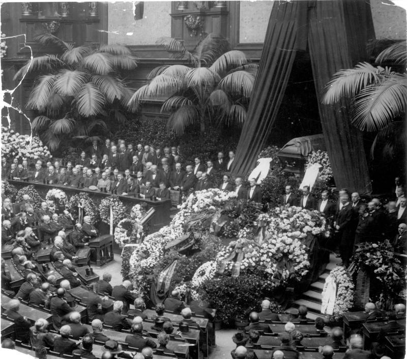 ADN-ZB /Archiv Berlin: Staatsakt am 12. Juli im Reichstag für den von der Reaktion am 24. Juni 1922 ermordeten deutschen Außenminister Walter Rathenau. 6787-22